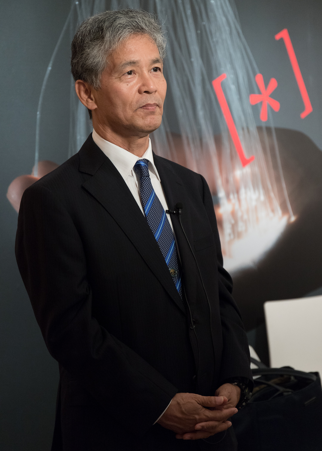 L'unicitàDell'immaginazione (10)